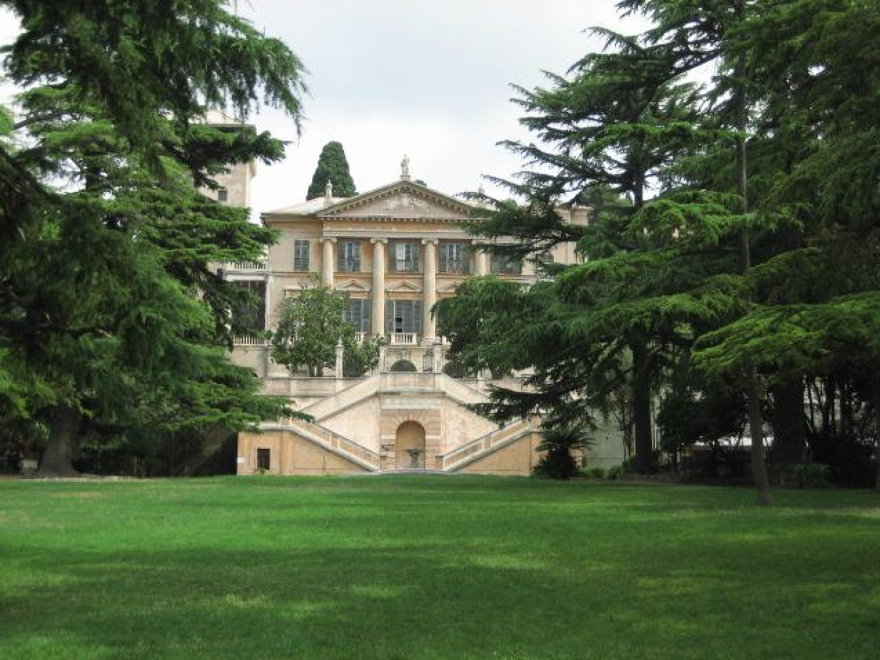 Villa Gruber De Mari, Genova